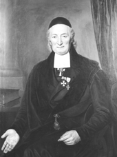 Portrait von Karl Christoph Gottlieb Zerrenner, deutscher Pädagoge (1780 - 1851)